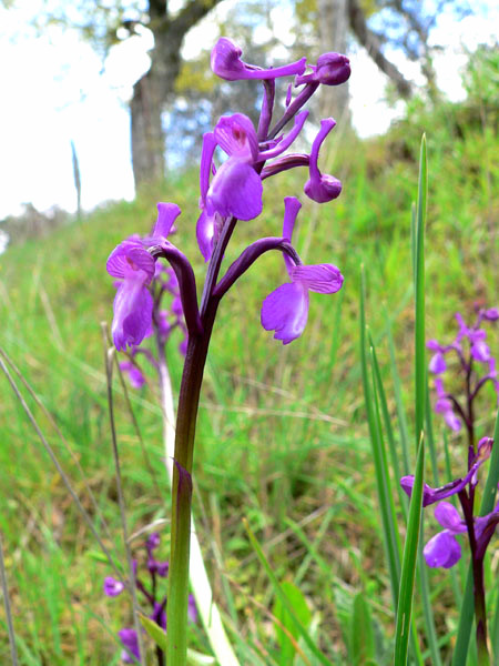 Orquídea en el Parque Natural de la Sierra de Cardeña Montoro